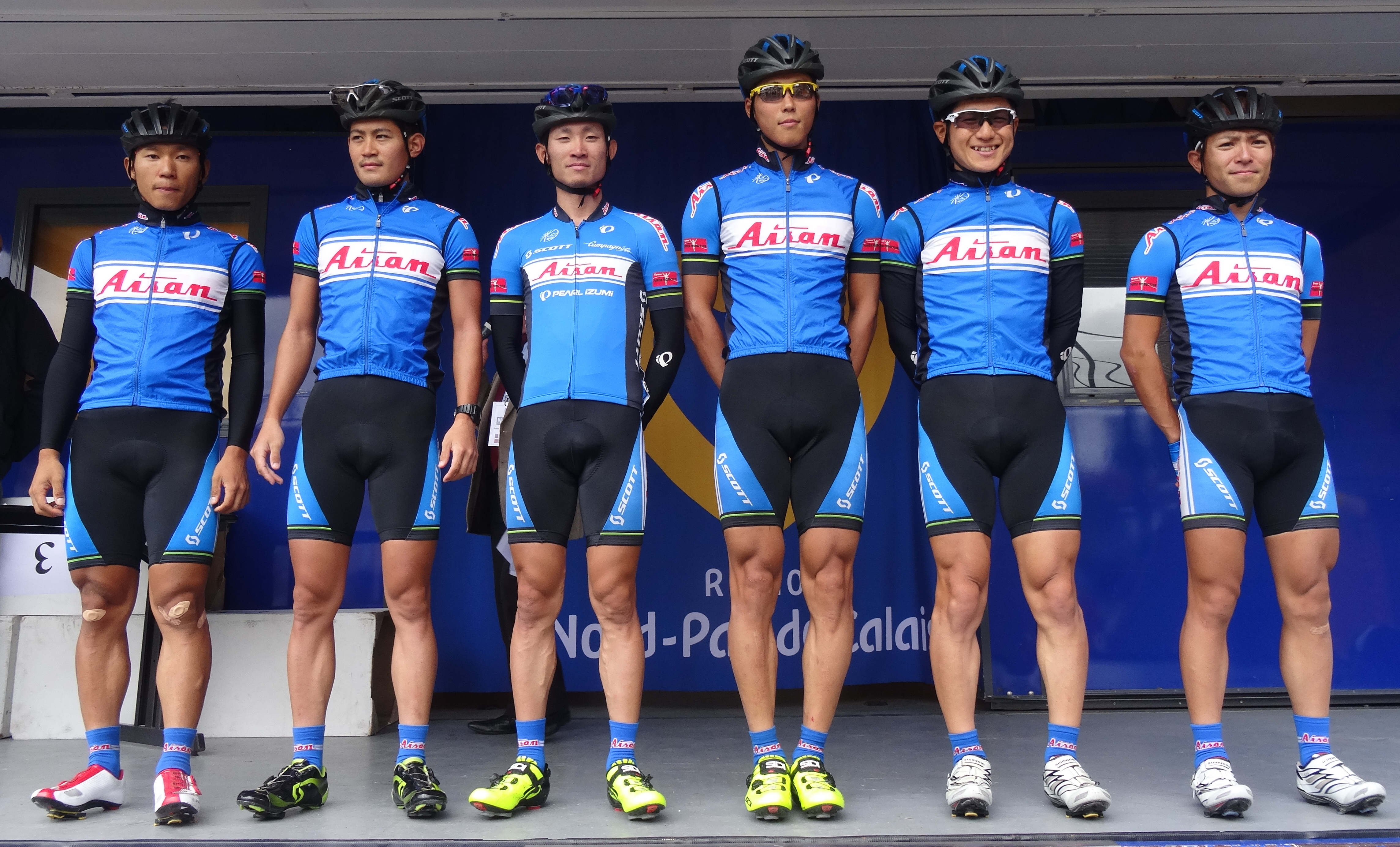 Reportage photographique réalisé le dimanche 13 juillet à l'occasion du départ et de l'arrivée de la Ronde pévéloise 2014 à Pont-à-Marcq, Nord-Pas-de-Calais, France.